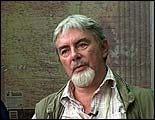 Mike McDonagh